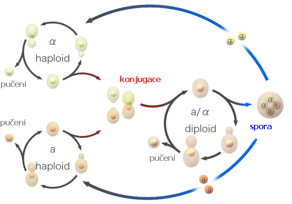 stazeno z wiki commons a pocesteno původní autor